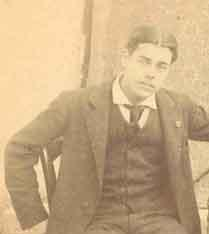 Le poète Afonso Lopes Vieira. Détail d'une photographie.